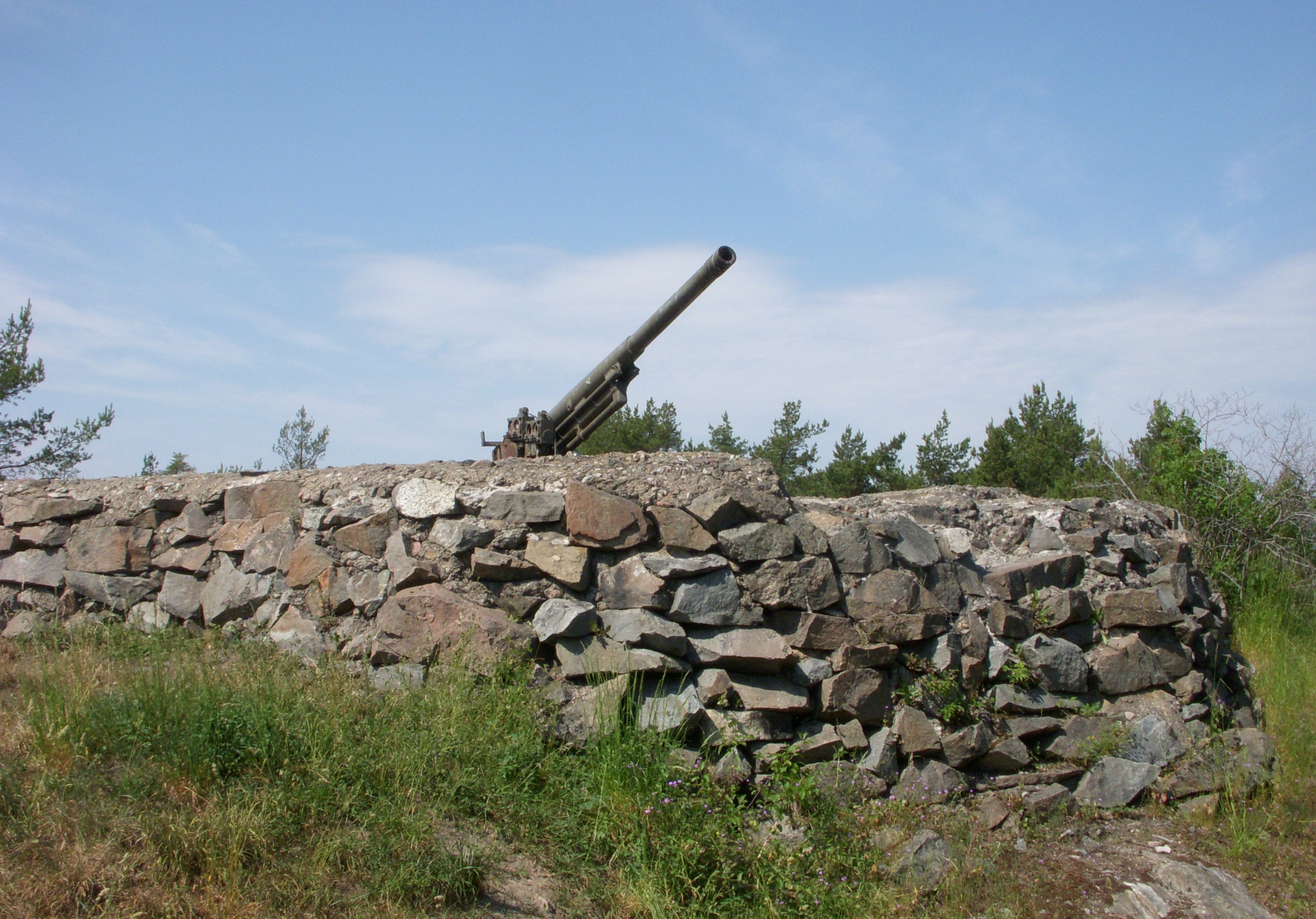 Luftvärnsbatteriet "Käppalaställningen" på Lidingö